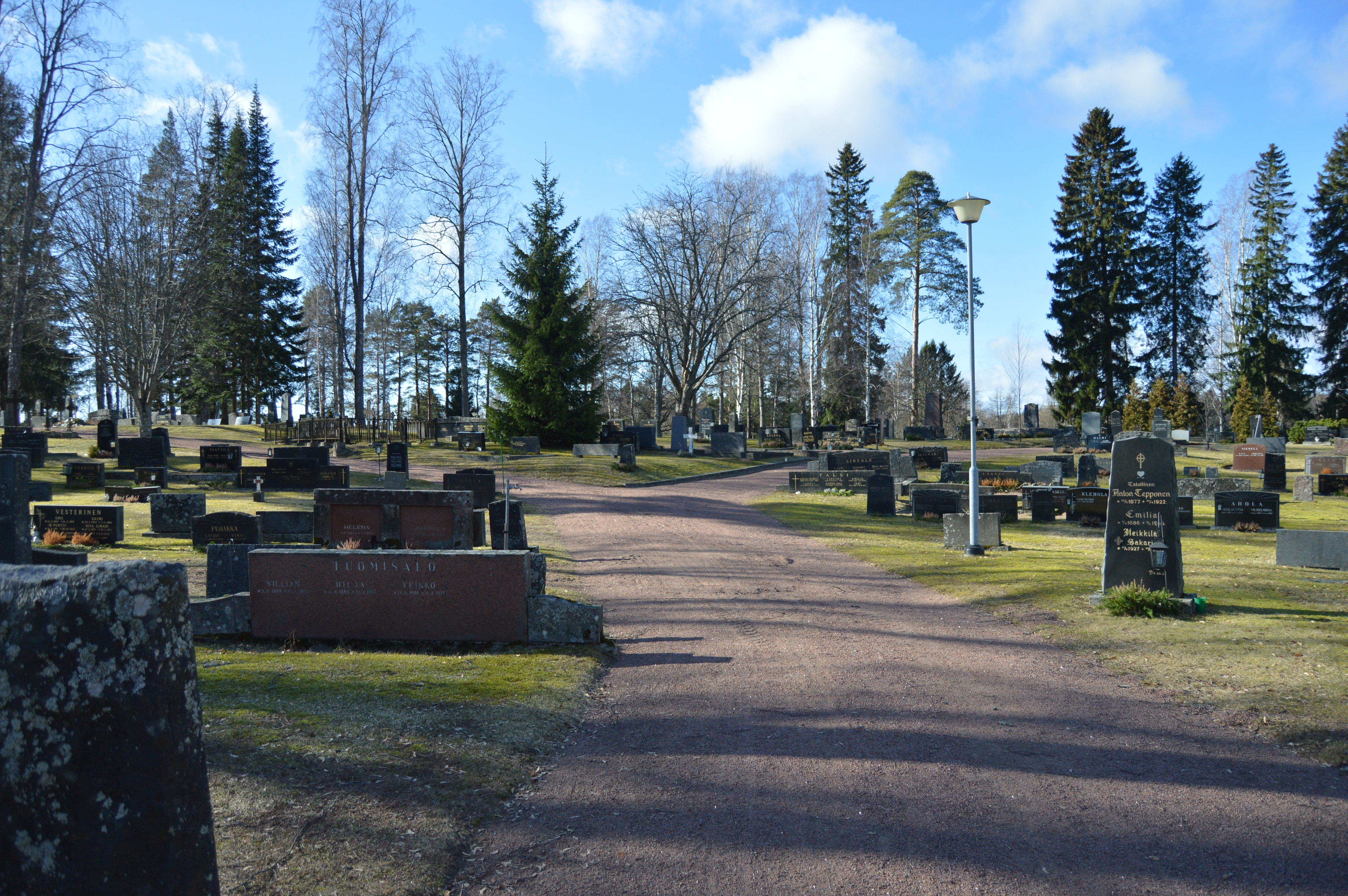 Haminan Husulassa sijaitseva Vehkalahden hautausmaa